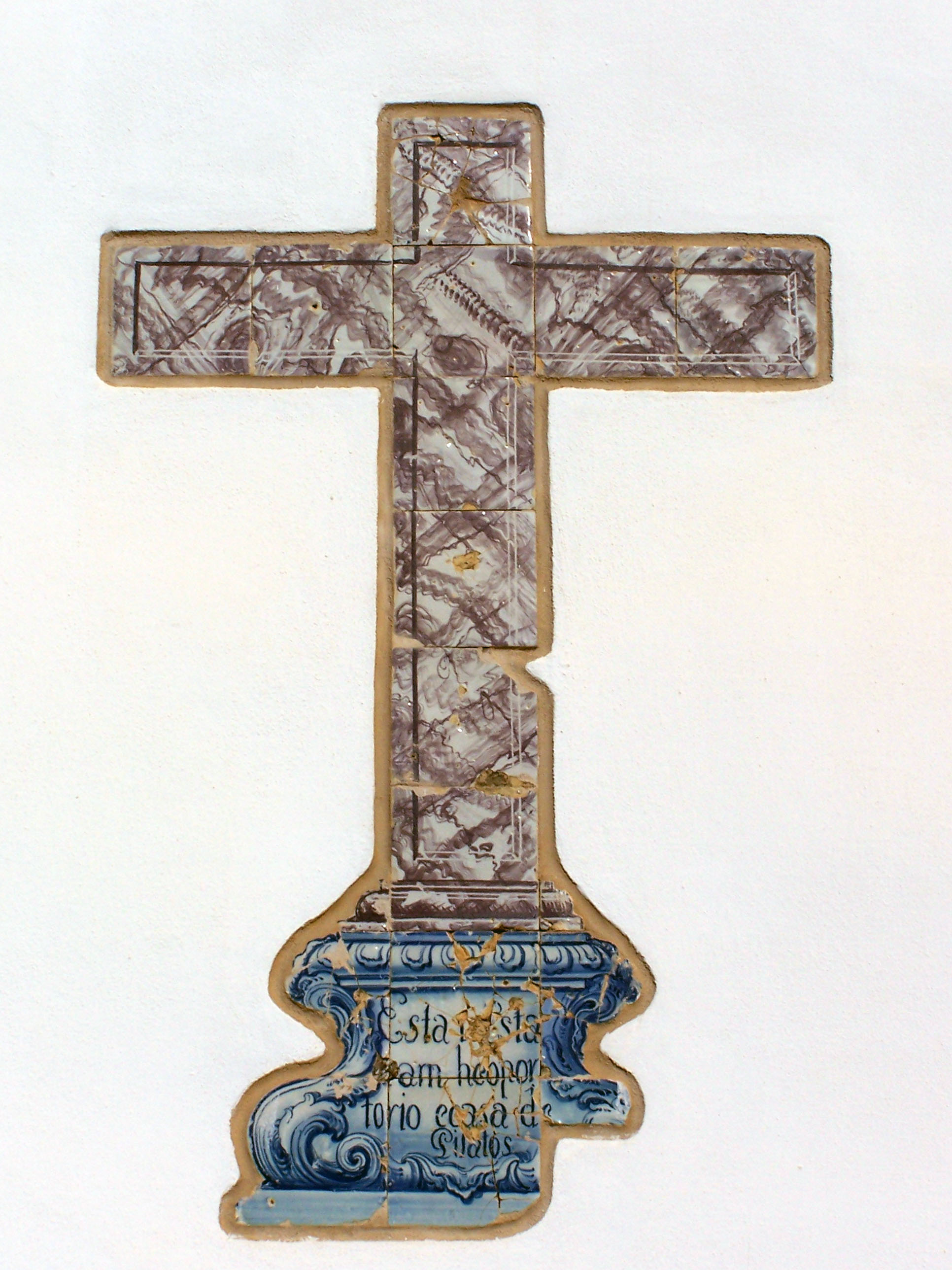 Pormenor da Ermida de Santa Ana de Tavira.